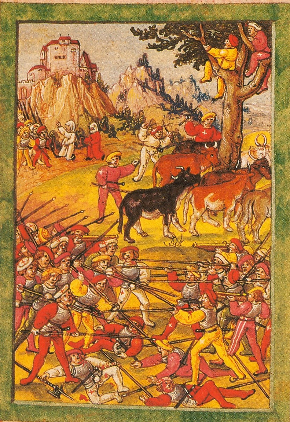 Schweizerkrieg/Schwabenkrieg. Kleinkrieg im Hegau: schwäbische Landsknechte versuchen vergeblich den Eidgenossen eine geraubte Viehherde wieder abzunehmen.